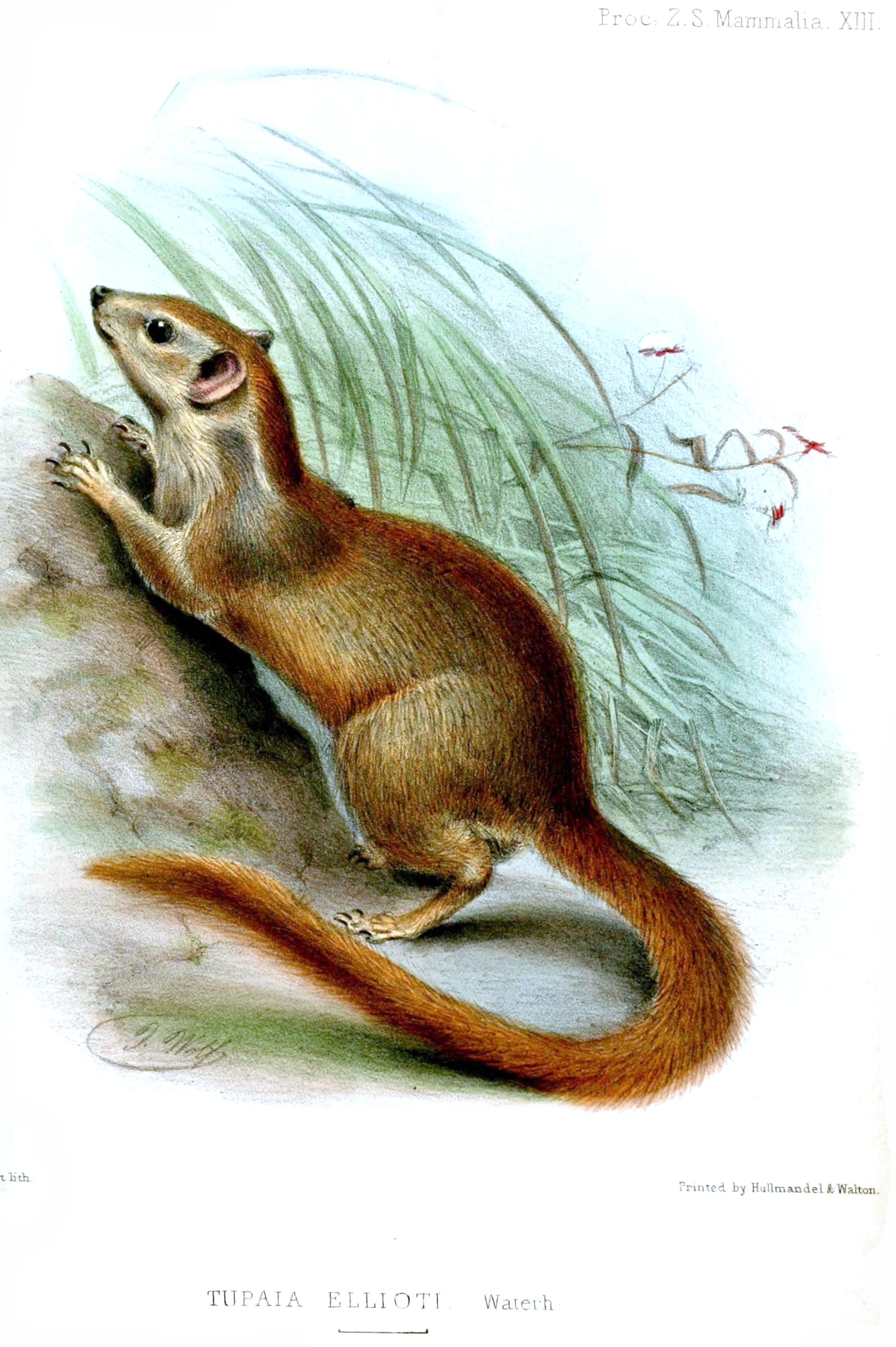 Tupaia ellioti = Anathana ellioti